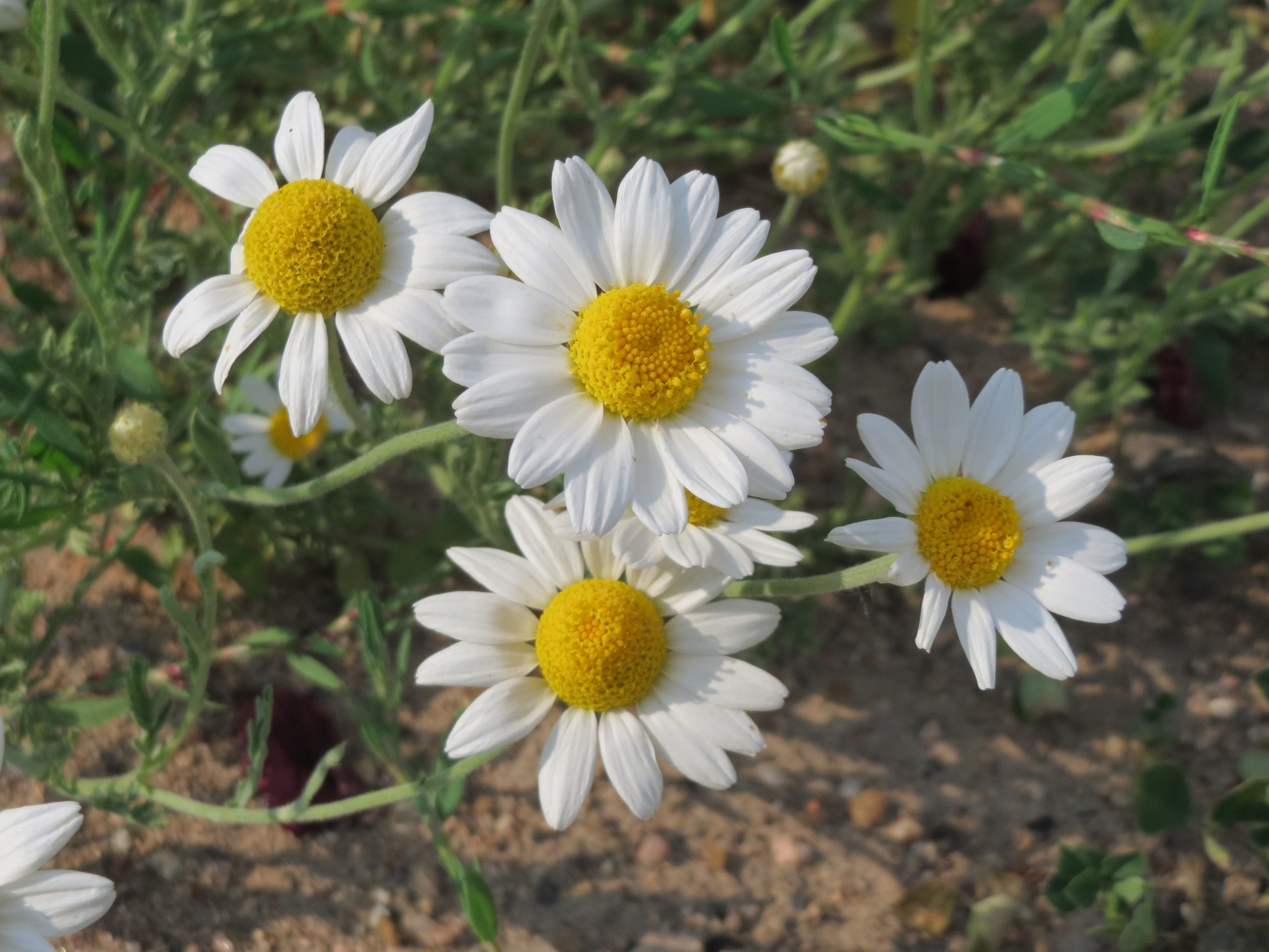 Hundskamille (Anthemis arvensis) in Neulußheim